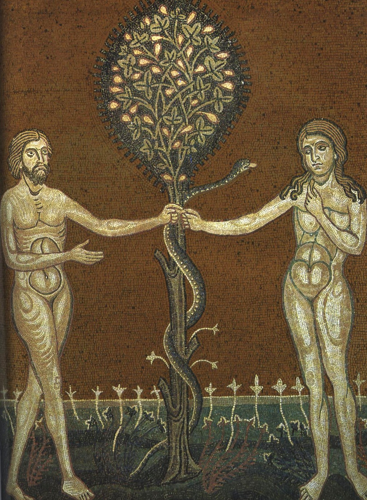 Cattedrale di Monreale, The Fall. Первородный грех — мозаика верхнего ряда северной стены